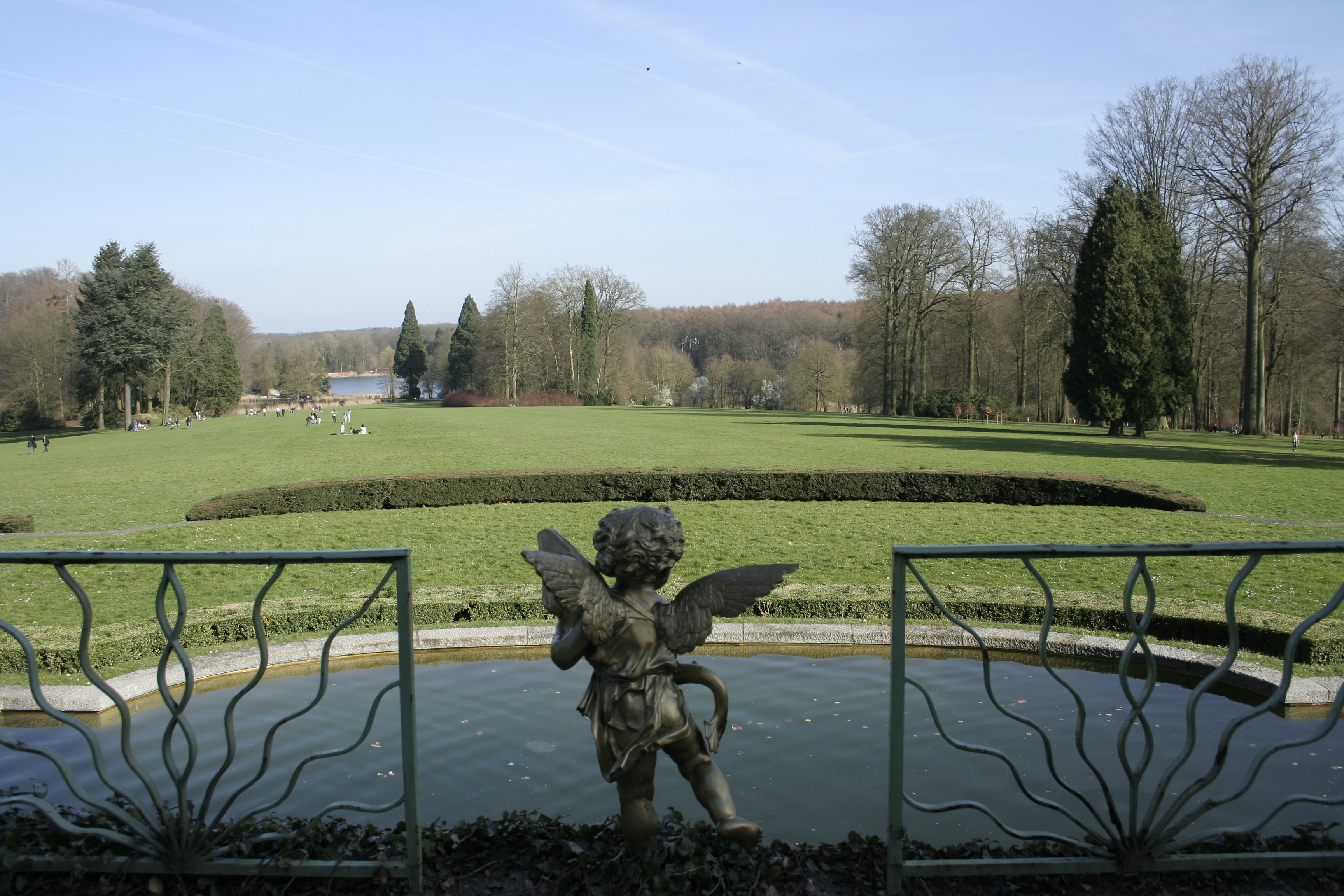 La Hulpe (Belgique), le bassin d'eau, le secteur occidental du parc et l'étang du Gris Moulin vus depuis la terrasse arrière du chateau Solvay.